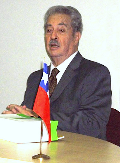 El escritor chileno José Miguel Varas en Moscú, durante un encuentro con sus lectores, diciembre de 2010